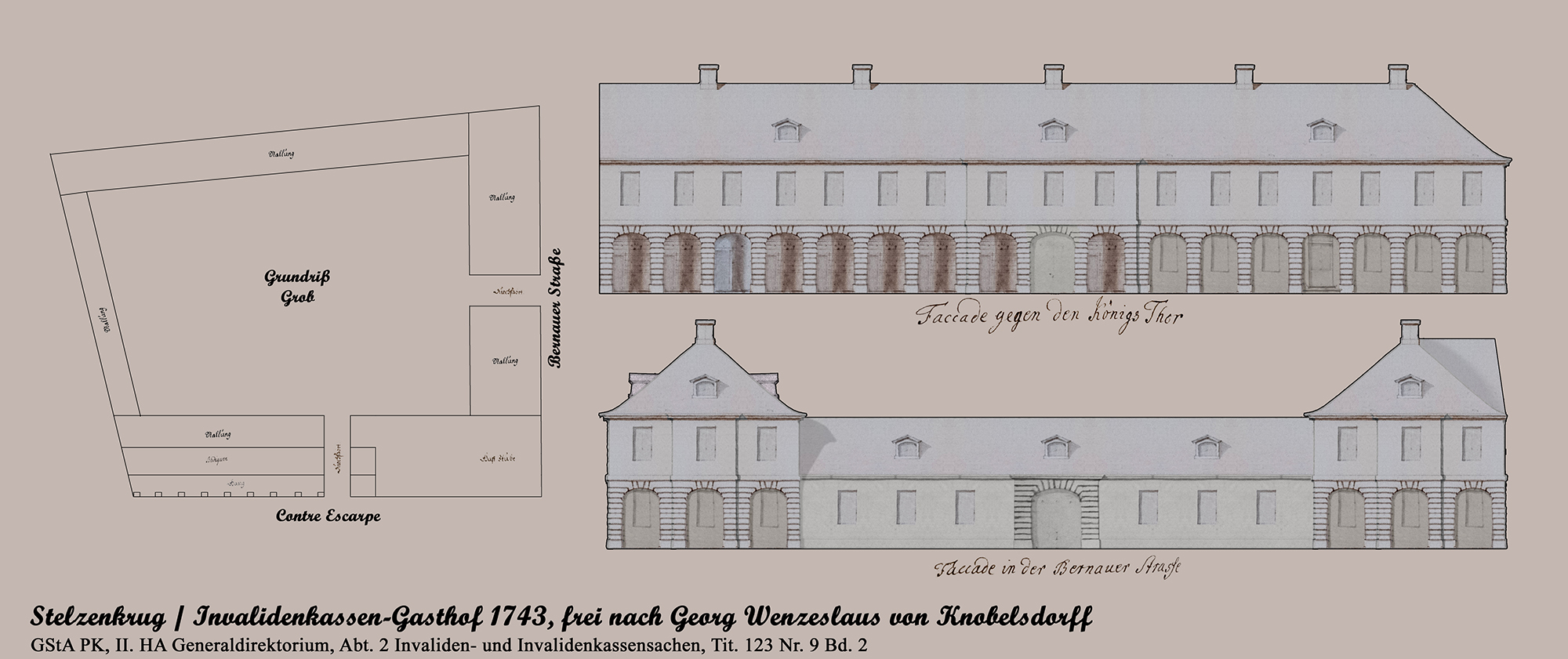 Das Bild zeigt das Aussehen des Stelzenkrugs frei nach den Plänen von Georg Wenzezlaus von Knobelsdorff. Die Originalpläne finden sich im Geheimen Staatsarchiv Preußischer Kulturbesitz GStA PK, II. HA Generaldirektorium, Abt. 2 Invaliden- und Invalidenkassensachen, Tit. 123 Nr. 9 Bd. 2, Blatt 73ff. Dieses Bild wurde mit Teilen von mir gemachter Fotografienen der Originalpläne neu erstellt.